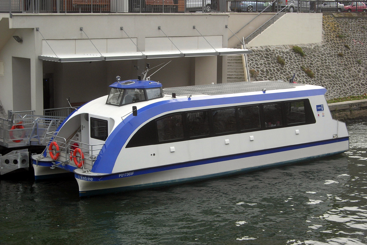 L'Estree a la station Corentin Cariou sur le canal Saint-Denis